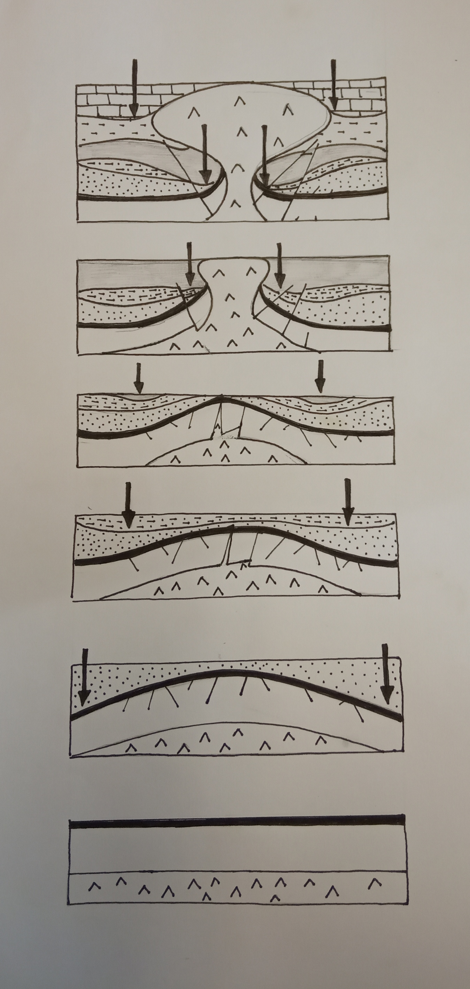 Diapiro baten eraketa faseak erakusten dituen marrazkia.